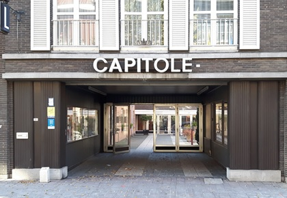 Cinema Capitol - Vooraanzicht 2016